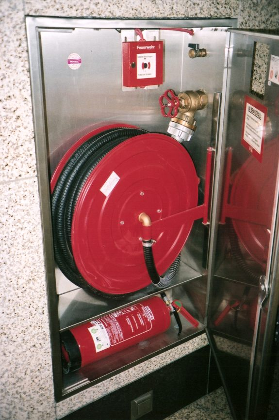 Ein Wandhydrant in einem Kaufhaus, im Februar 2004 in Viernheim fotografiert. Dieses Foto wurde von Martin Hawlisch fotografiert und unter der GFDL veröffentlicht.